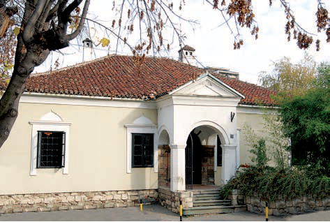 Божићева кућа, С.Неговановић